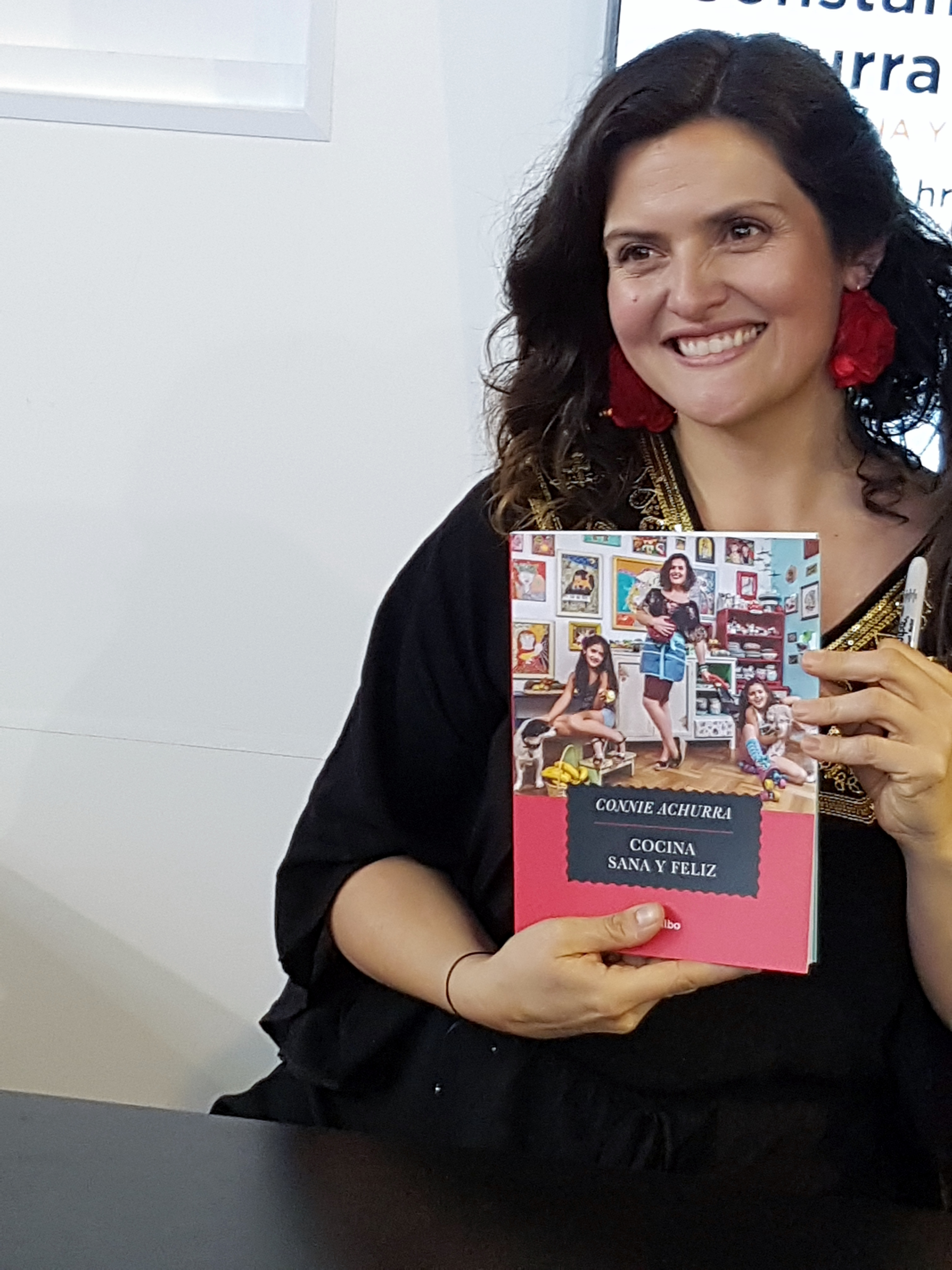 La cocinera y activista chilena de cocina saludable Connie Achurra en la Feria Internacional del Libro de Santiago 2017.